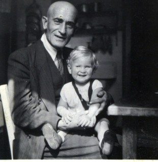 Григорій Стецюк з сином Теодором (Дорком) у 1944 в Німеччині